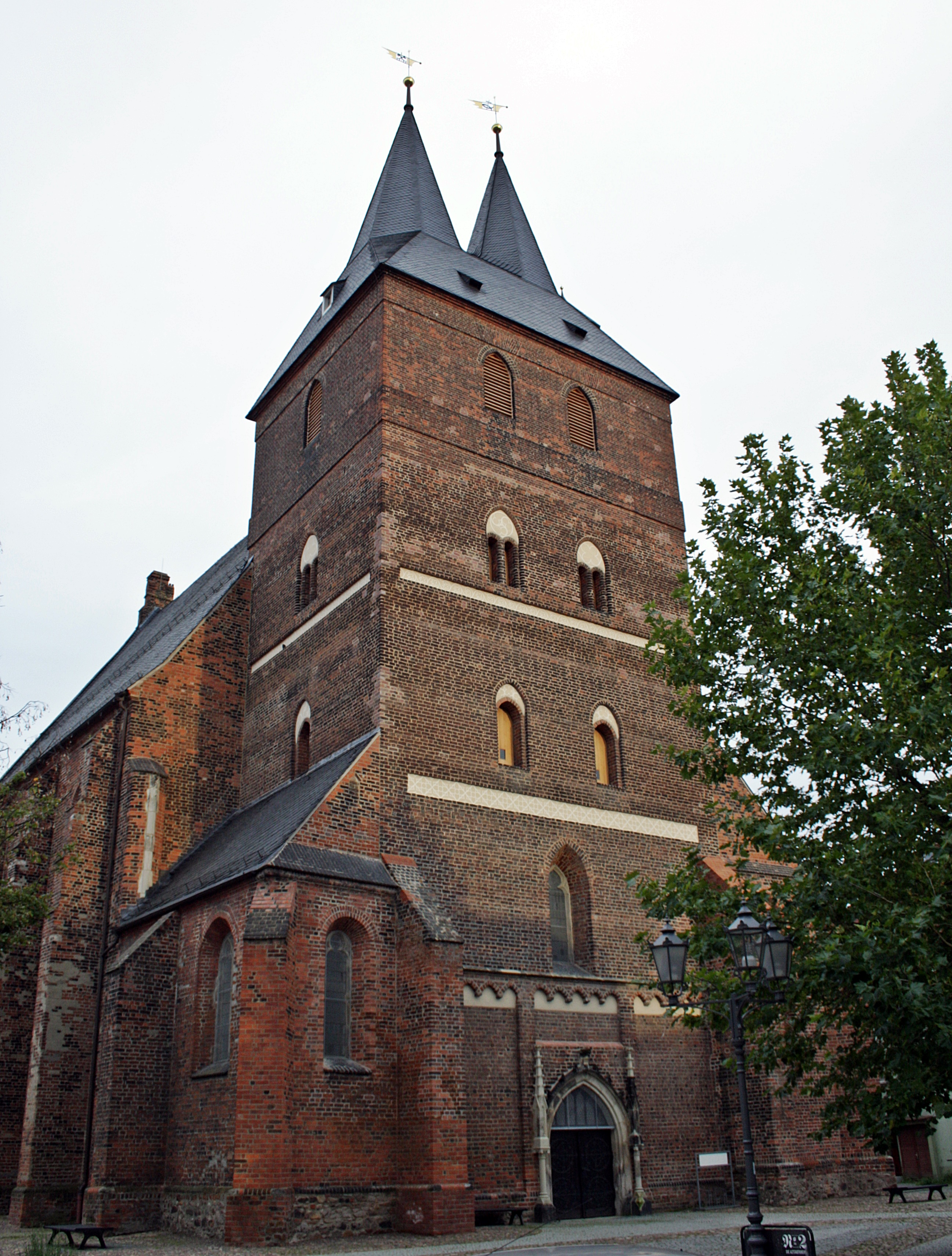 Stadtkirche St.Peter & Paul (Delitzsch) - Westseite